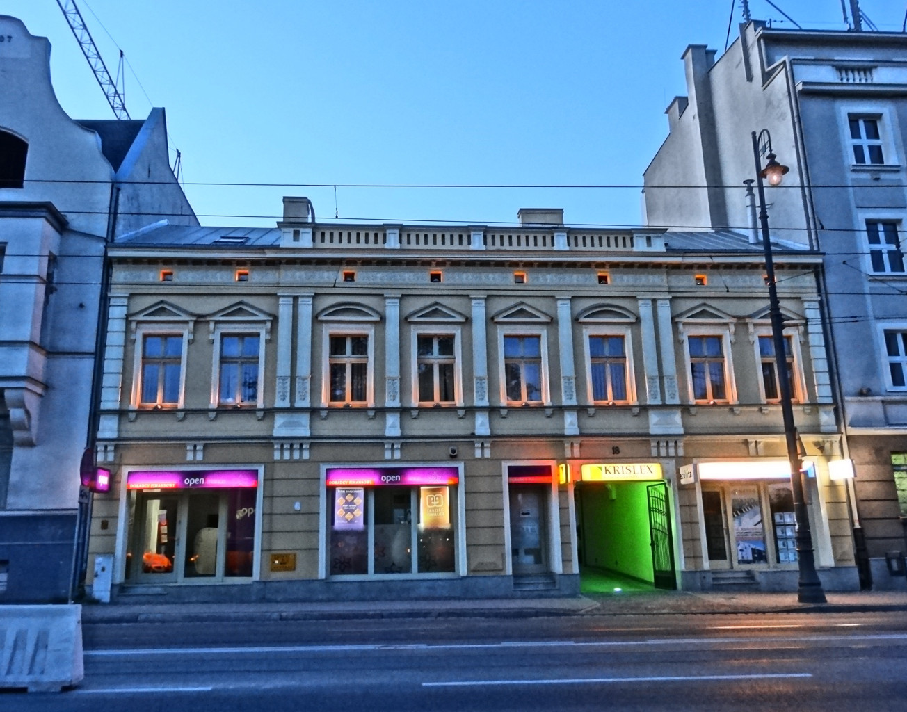 Ulica Ferdynanda Focha w Bydgoszczy